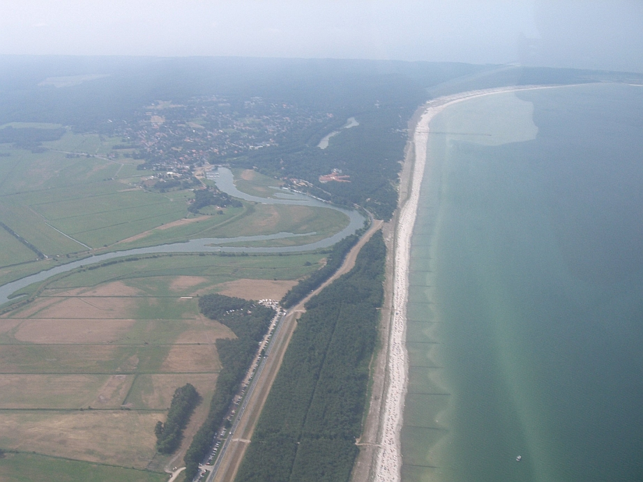 Küstenlinie bei Prerow